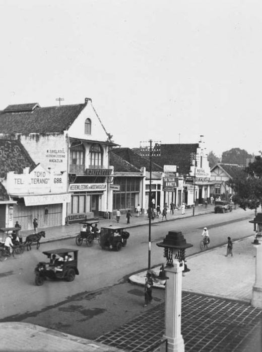 Foto. Suasana di paruh pertama abad ke-20 di Jalan Malioboro, Yogyakarta